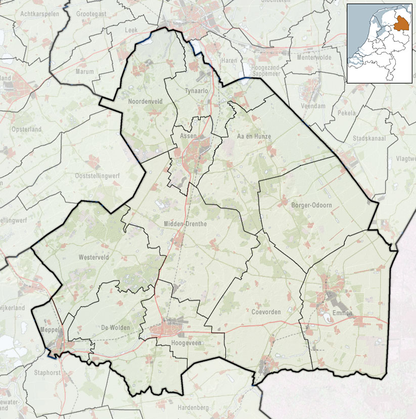 Referentiekaart van Provincie Drenthe, met indeling van gemeenten (2010) en impressie van het landschap. Door Jan-Willem van Aalst, samengesteld uit publiek beschikbare geo-data: Referentie-ondergrond (kustlijn, steden, wegen) gerasterd uit de OpenStreet Map OSM. ( Inhoud is beschikbaar onder de Creative Commons Attribution-ShareAlike 3.0 license. Referentie-ondergrond op water bewerkt vanuit Gebruik is vrij met bronvermelding NLR en ESA. Vectorgrenzen van gemeenten en regio's vrij ter beschikking gesteld met dank aan cartografen van brandweerregio's Hollands-Midden en IJsselland; gerasterd in Photoshop. Hoogte-aanduidingen (reliëf) gerasterd uit de AHN Viewer ( gebruik is vrij met bronvermelding (c) AHN, Overige kenmerken op de kaart: eigen tekenwerk van Jan-Willem van Aalst, op basis van gerasterde gemeentegrenzen.